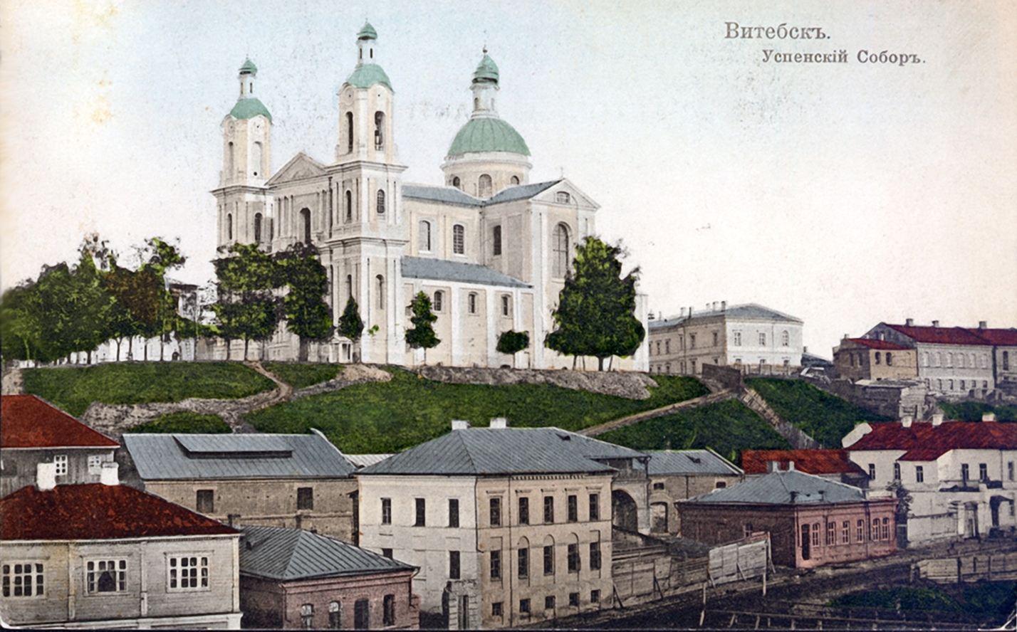 Беларуская (тарашкевіца): Віцебск (Viciebsk), Прачысьценская гара (Pračyścienskaja hara). Царква Прачыстай Багародзіцы